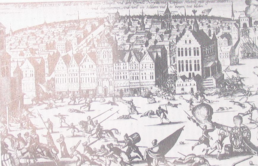 Engelse Furie te Mechelen op 9 april 1580. Stadsarchief Mechelen, Iconografische Beeldbank